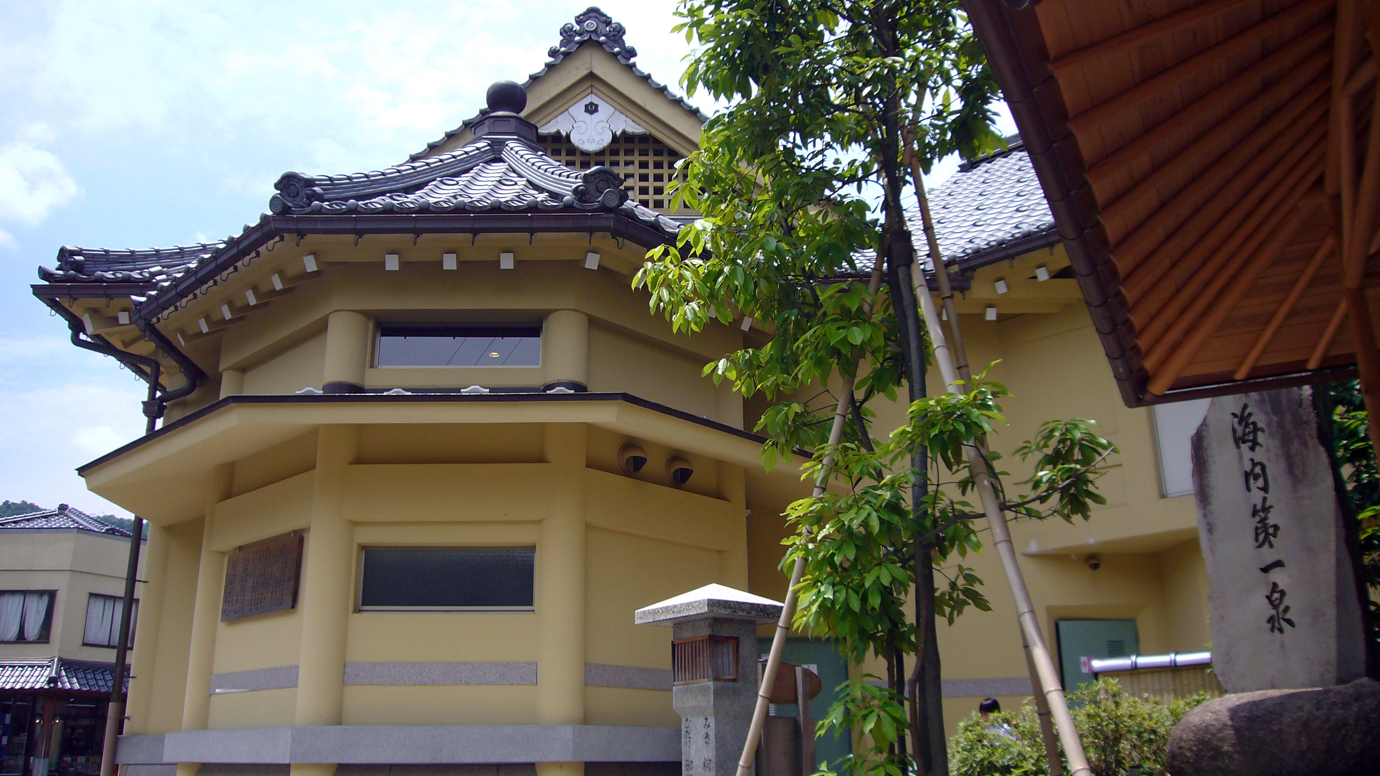 Ichino-yu, Kinosaki Onsen in Toyooka, Hyogo prefecture, Japan